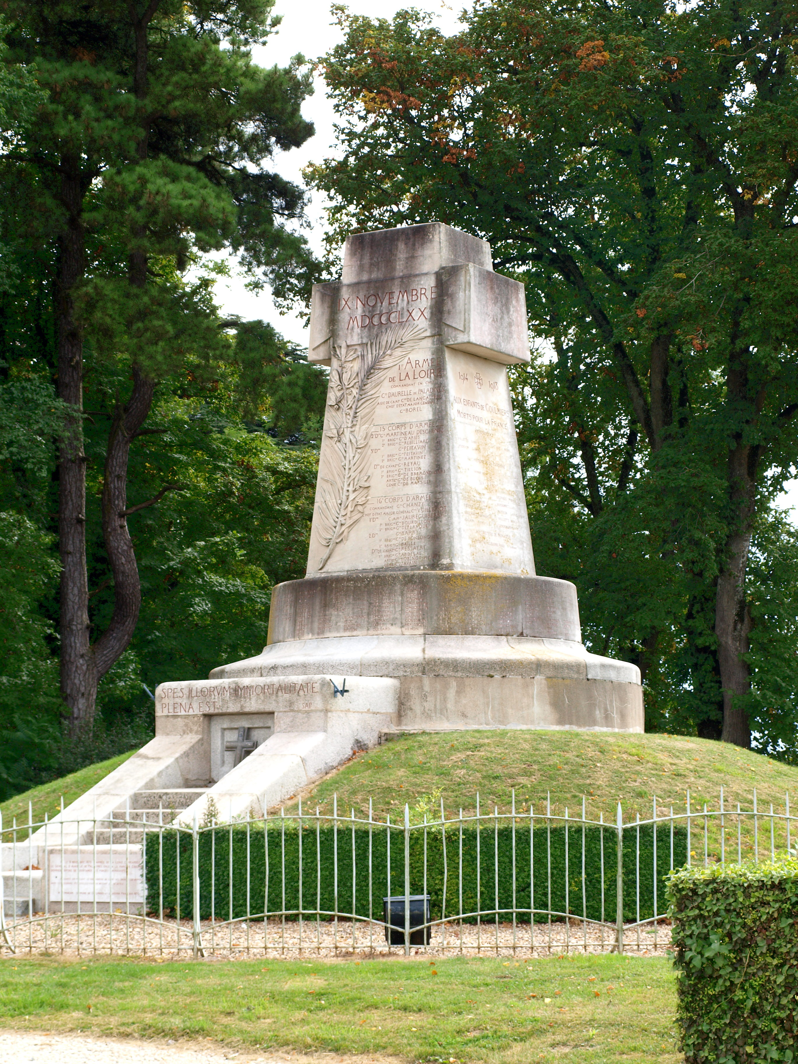 Coulmiers (Loiret, France) ; mémorial & ossuaire français de la bataille de Coulmiers le 9 novembre 1870. Le monument fait office aussi de monument aux morts des guerres du XXe siècle.